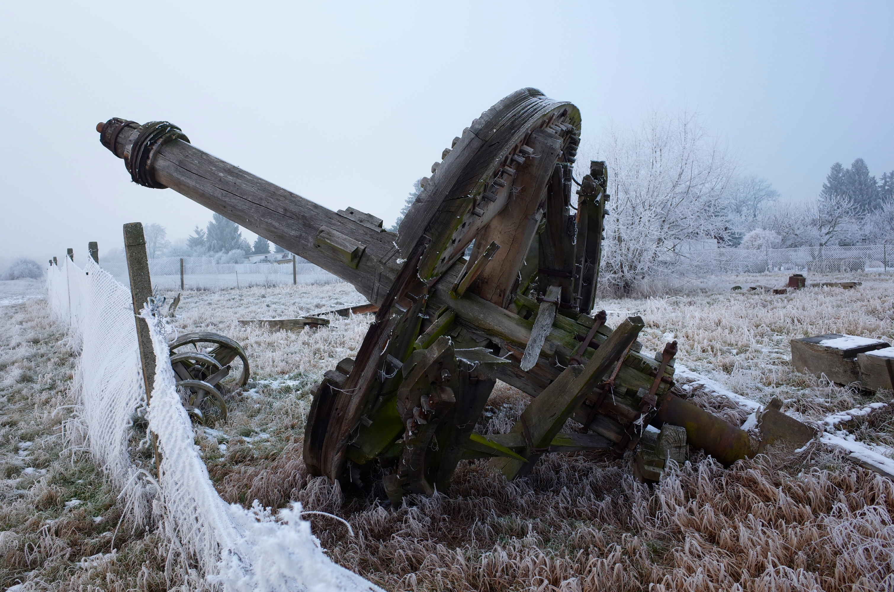 Landsberg (Saalekreis), Flügelwelle mit Kammrad der eingestürzten Windmühle im Ortsteil Dammendorf.